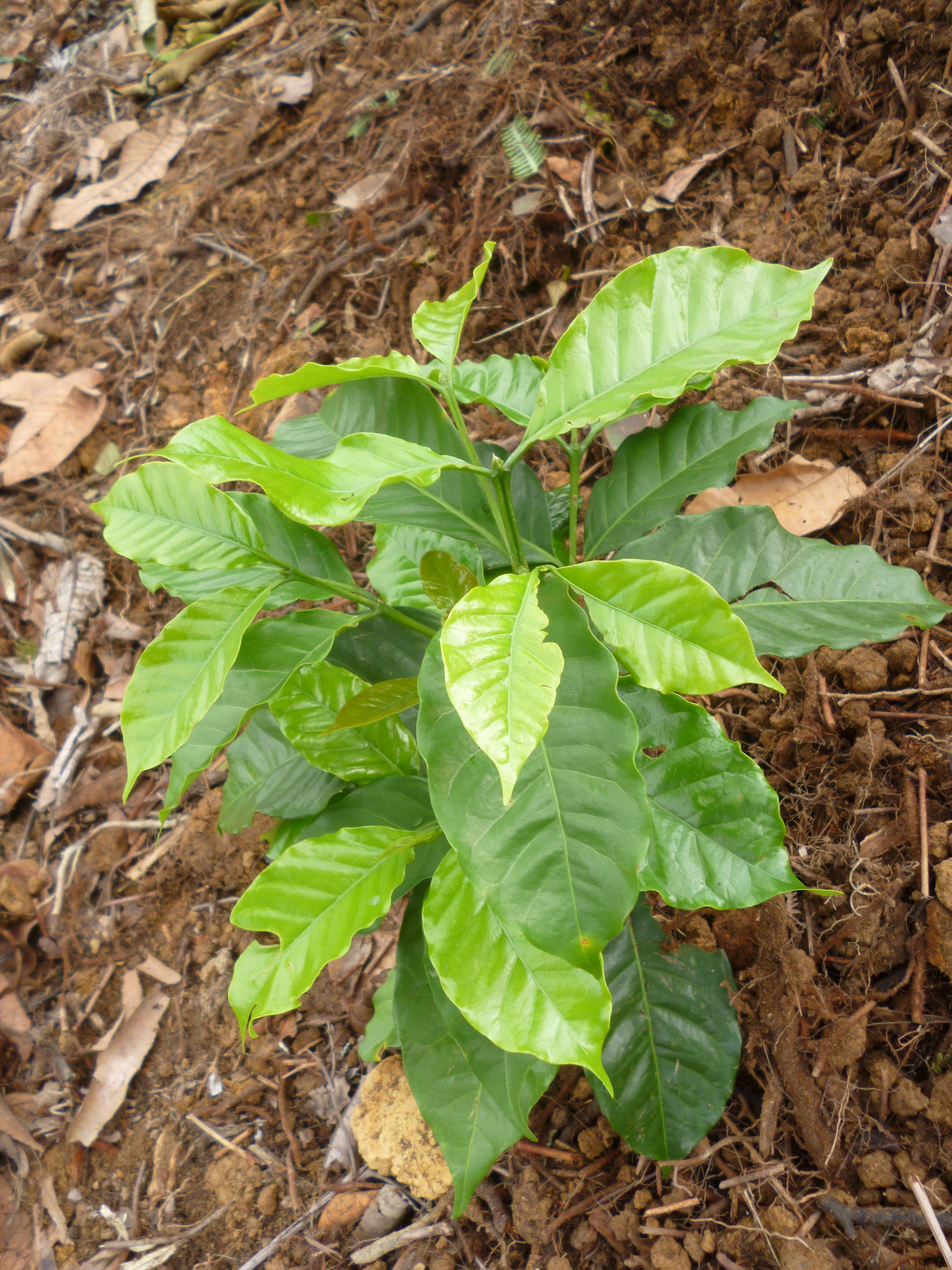 Planta joven de café tipo caturro-arábica en San Roque, Colombia